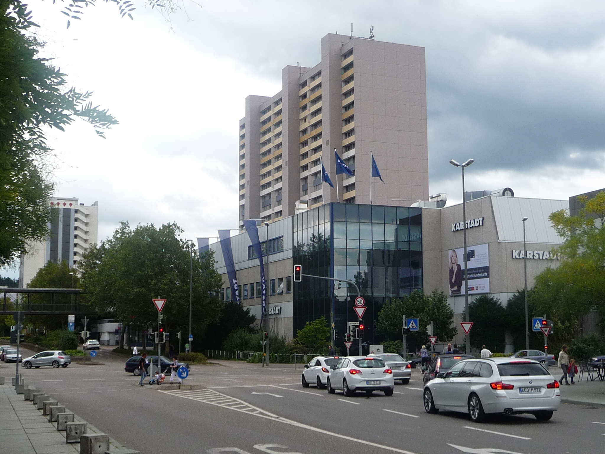 Der Neuköllner Platz in Leonberg mit Hotel Amber, Hochhaus und Leo-Center